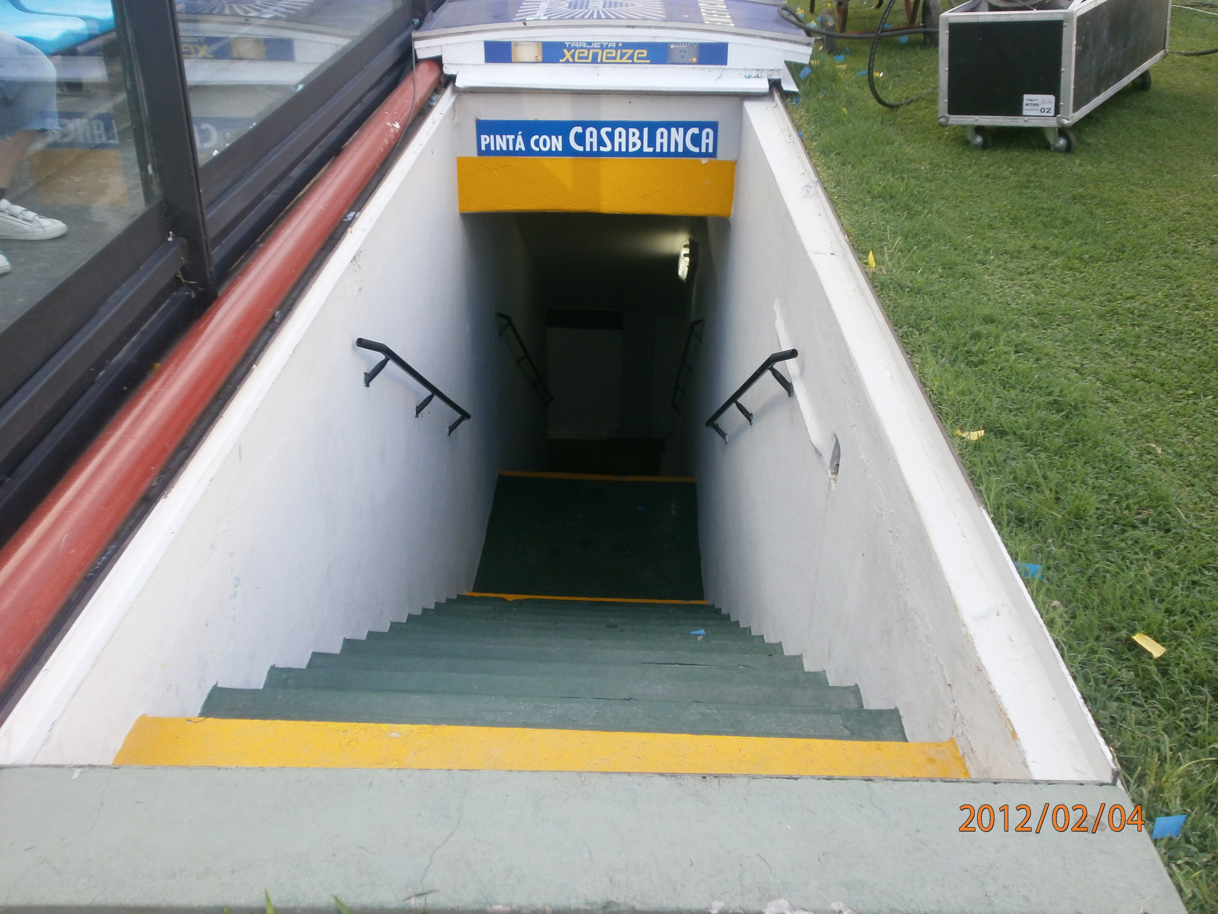 Túnel de La Bombonera